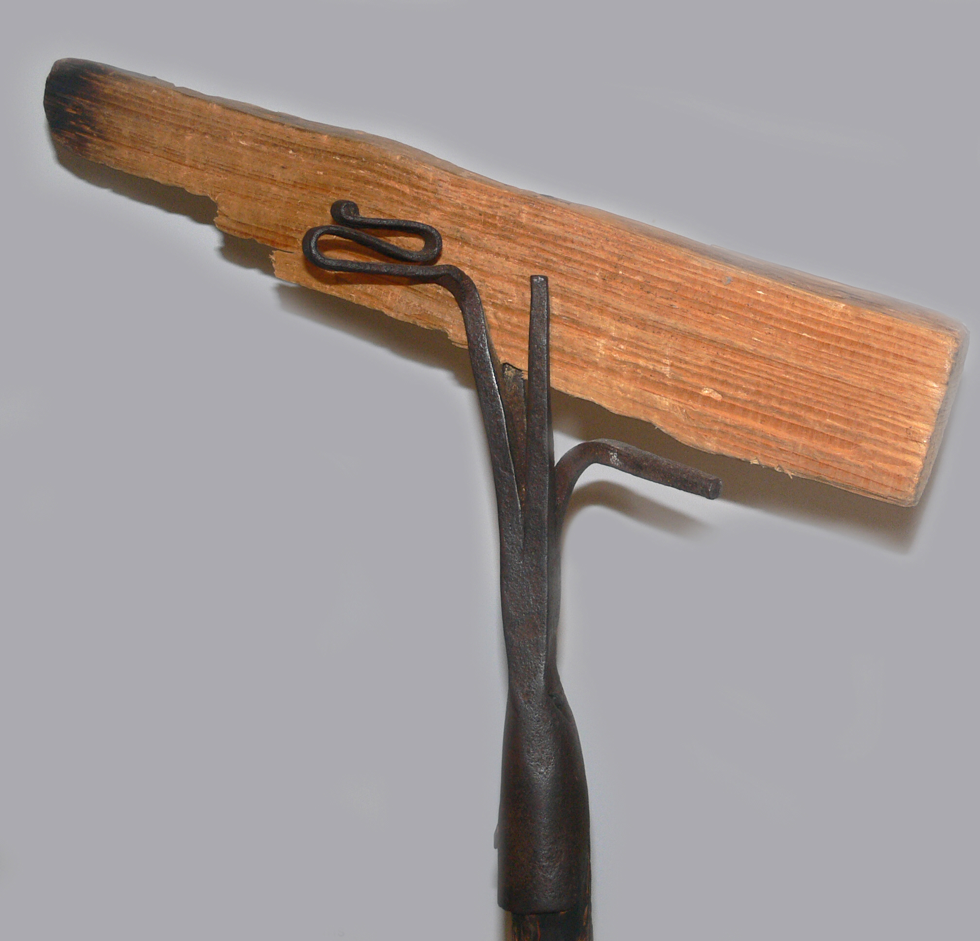 Kienspanbeleuchtung Landesmuseum Württemberg (Außenstelle Museum der Alltagskultur, Waldenbuch)